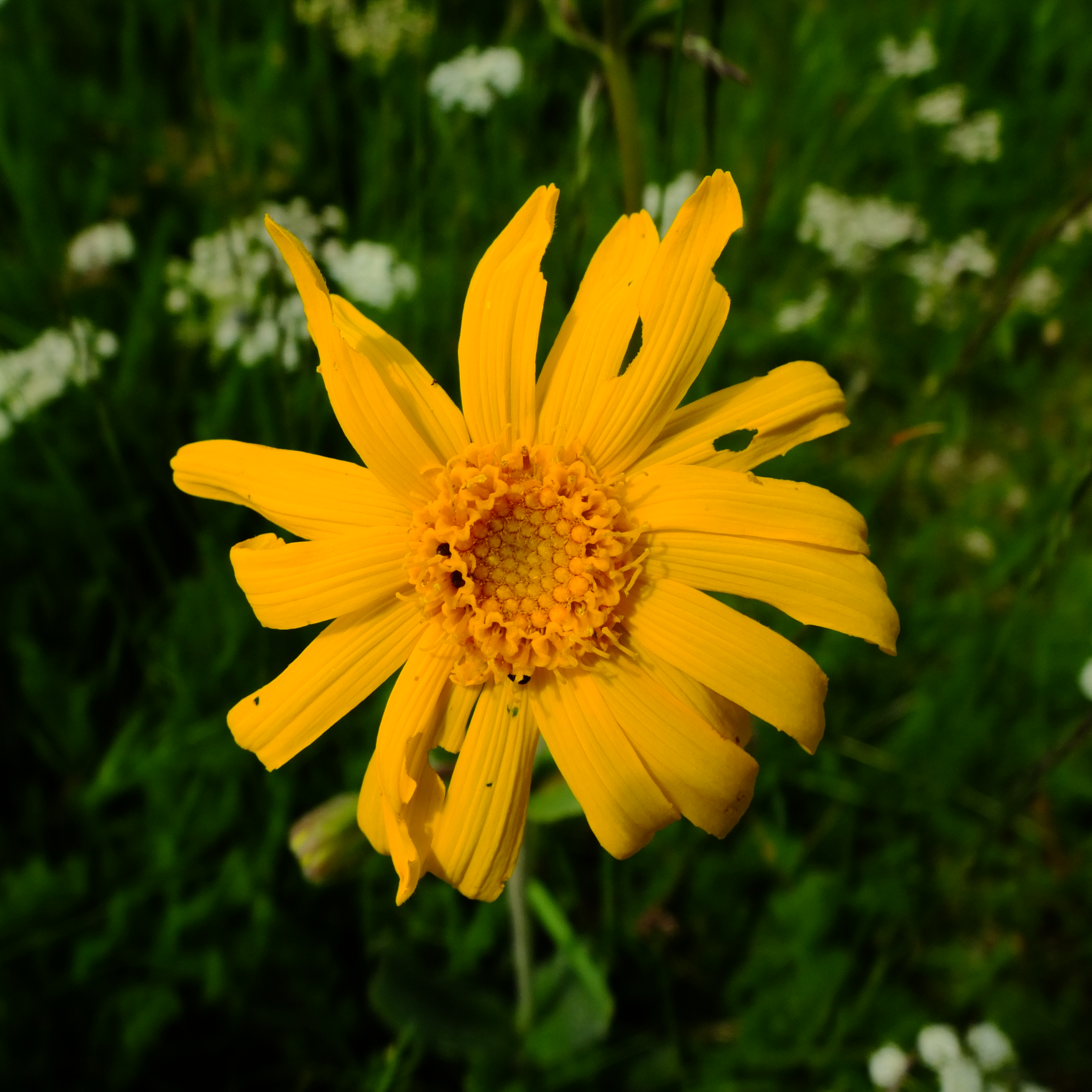 Capitule d'arnica des montagnes